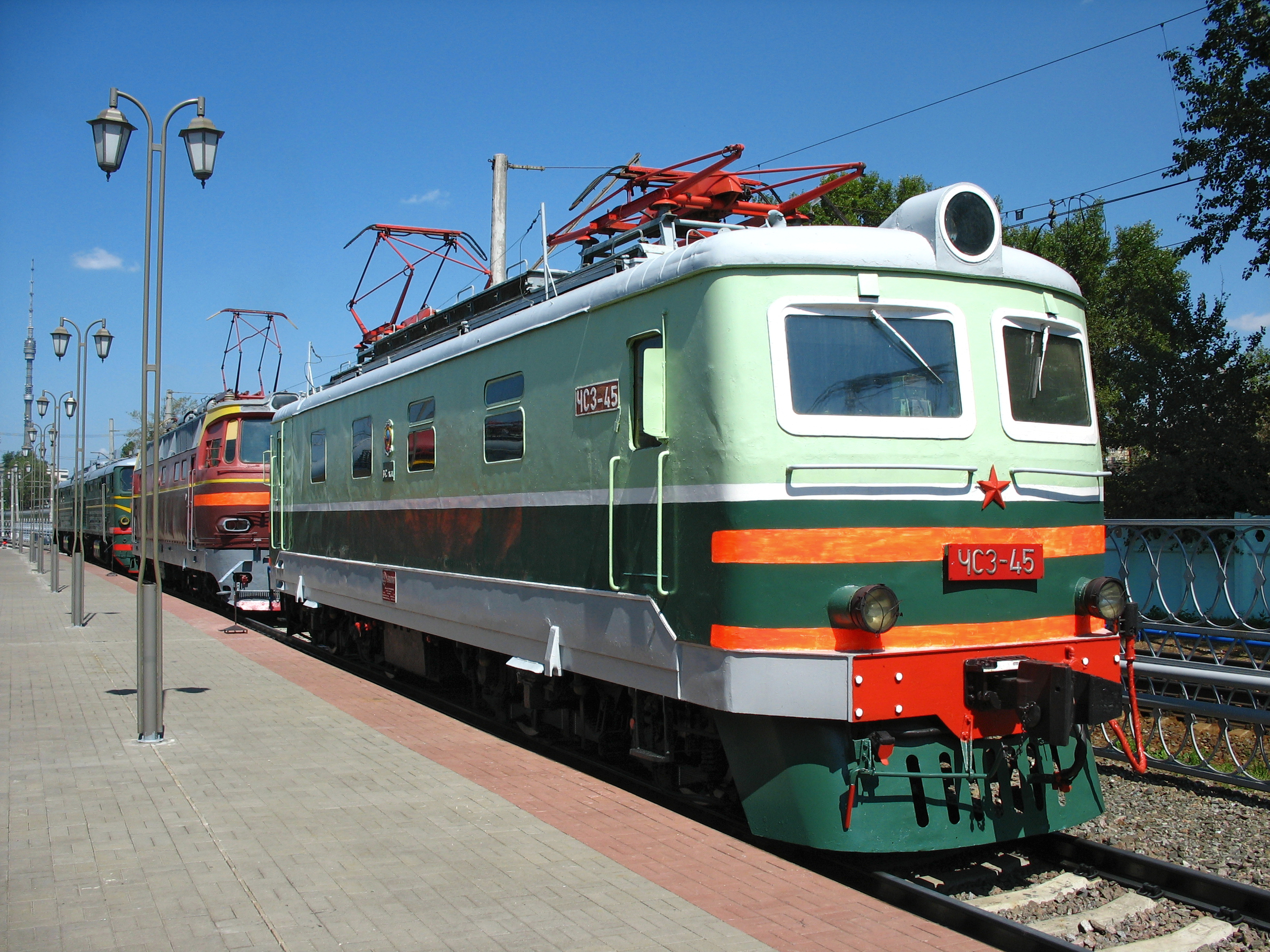 Электровоз ЧС3-45 в Музее истории развития железнодорожного транспорта Московской железной дороги. Рижский вокзал, Москва 2007 г.